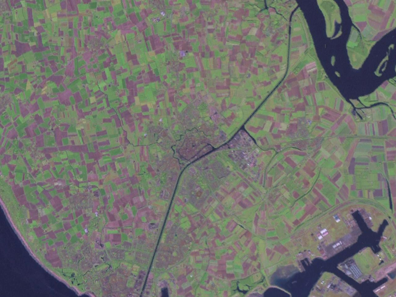 Middelburg - Zeeland - Nederland, satellietfoto.